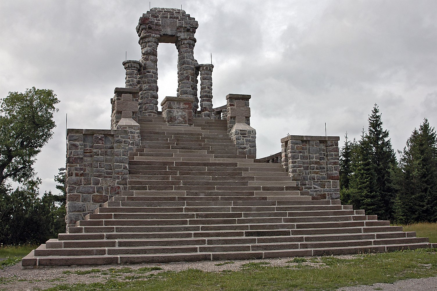 Karl Günter Denkmal auf dem Langen Berg, Gehren